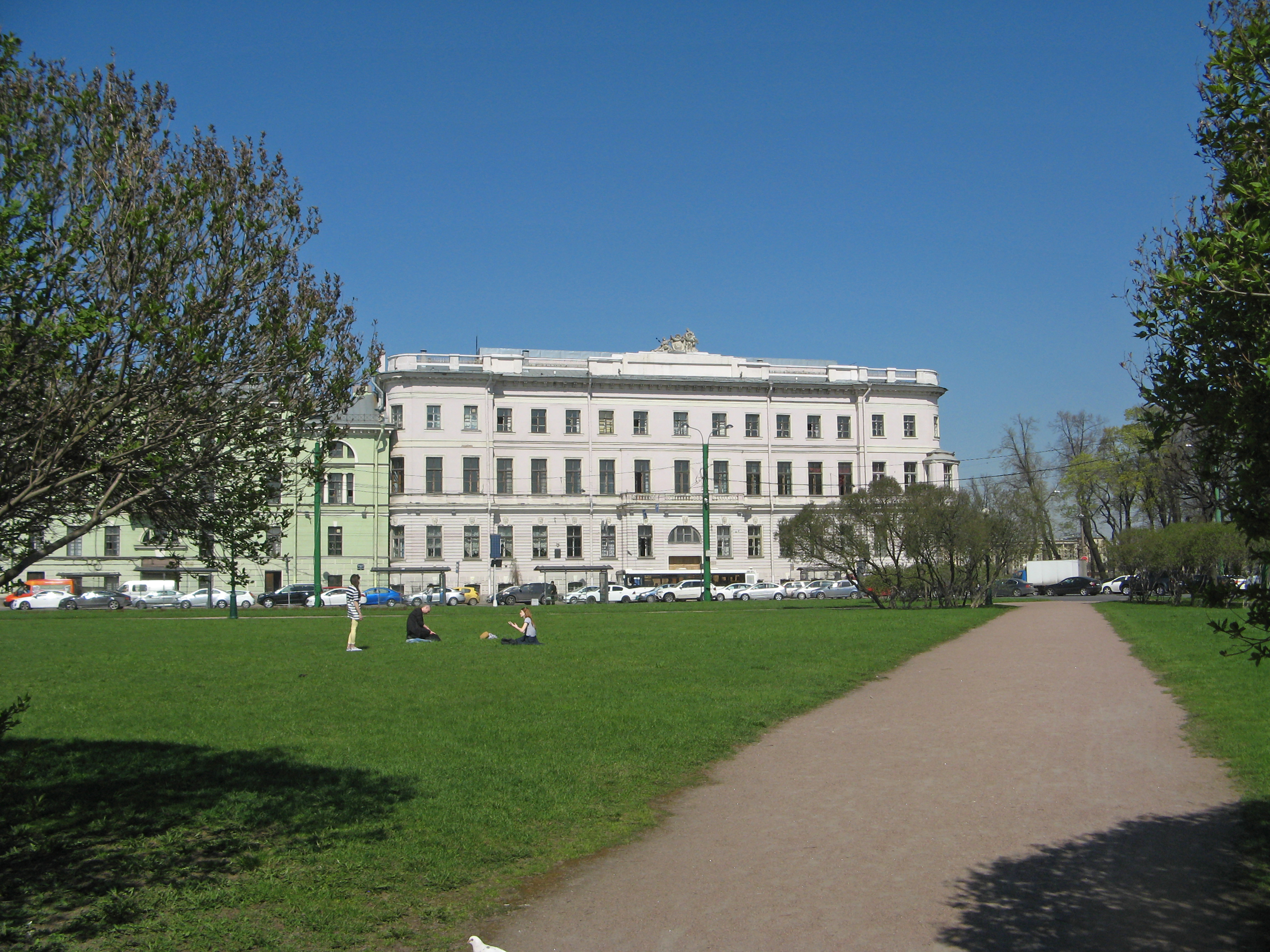 Дом И.И. Бецкого (дворец принца П.Г. Ольденбургского): Дворцовая набережная, 2, Миллионная улица, 1, набережная Лебяжьей канавки, Центральный район, Санкт-Петербург